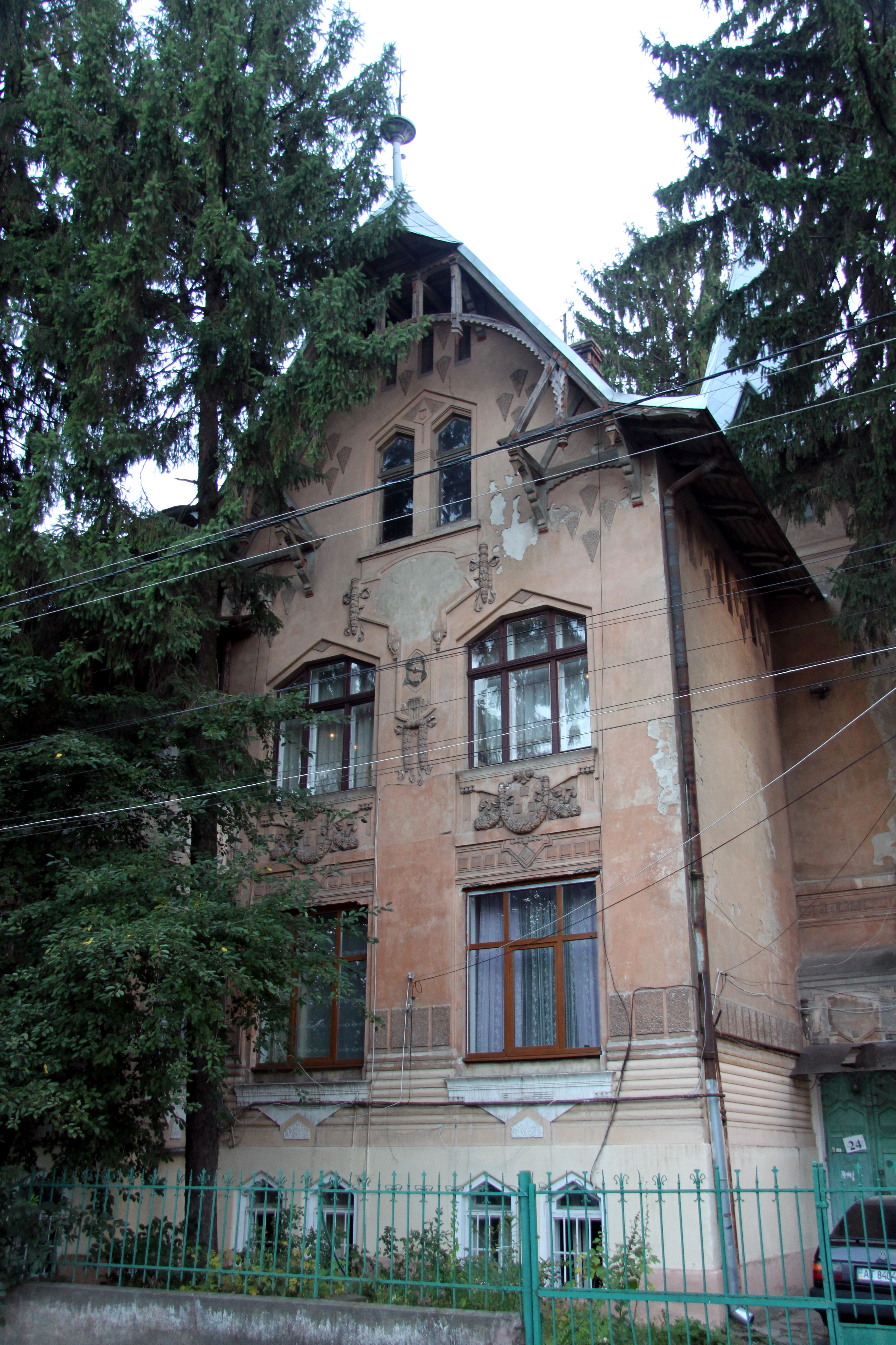 Житловий будинок, Федьковича Юрія, 24, Чернівці